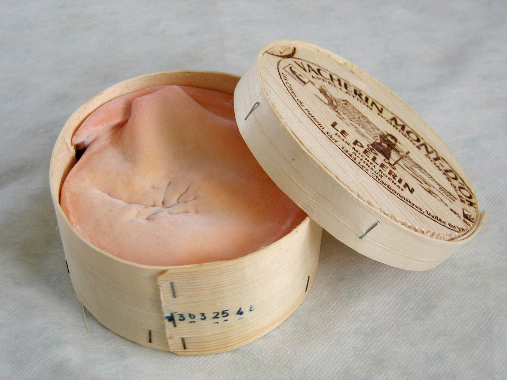 Vacherin Mont d'Or, Switzerland AOC